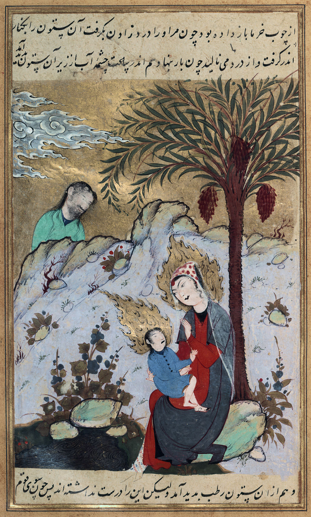 Mariam and Isa